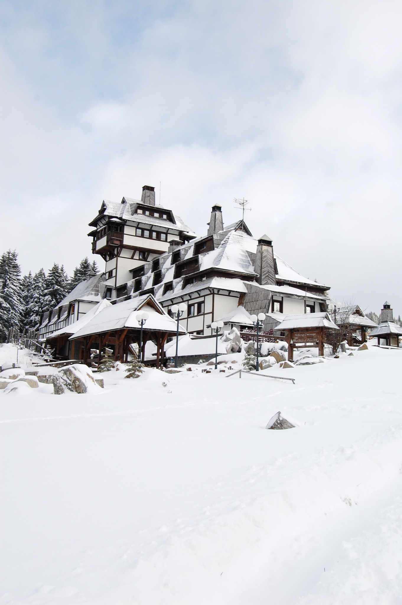 Nebeske Stolice hotel on Kopaonik.